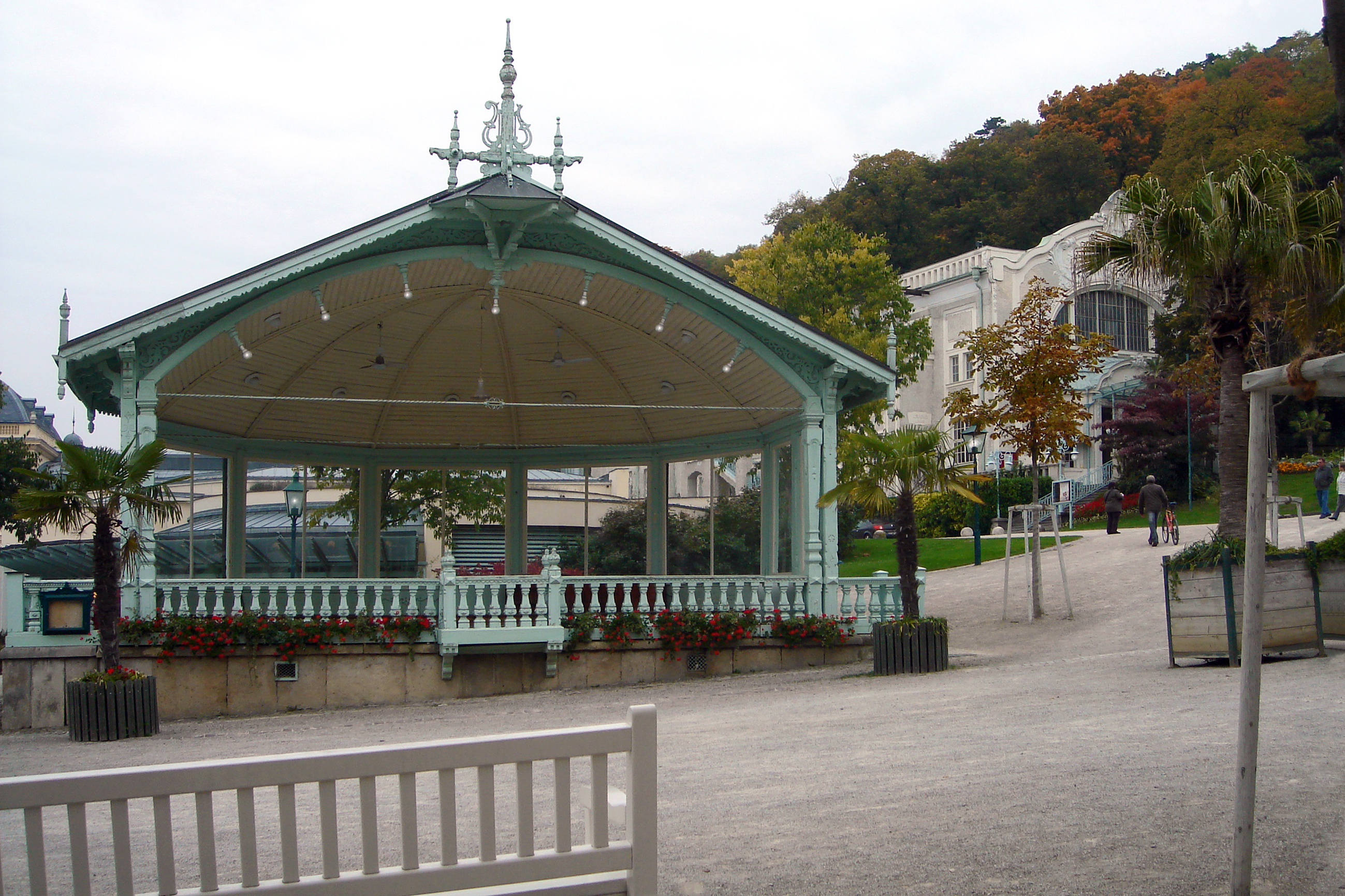 Baden bei Wien, Kurpark (an der Hauptallee), Musikpavillon (1894),Arena (1906)